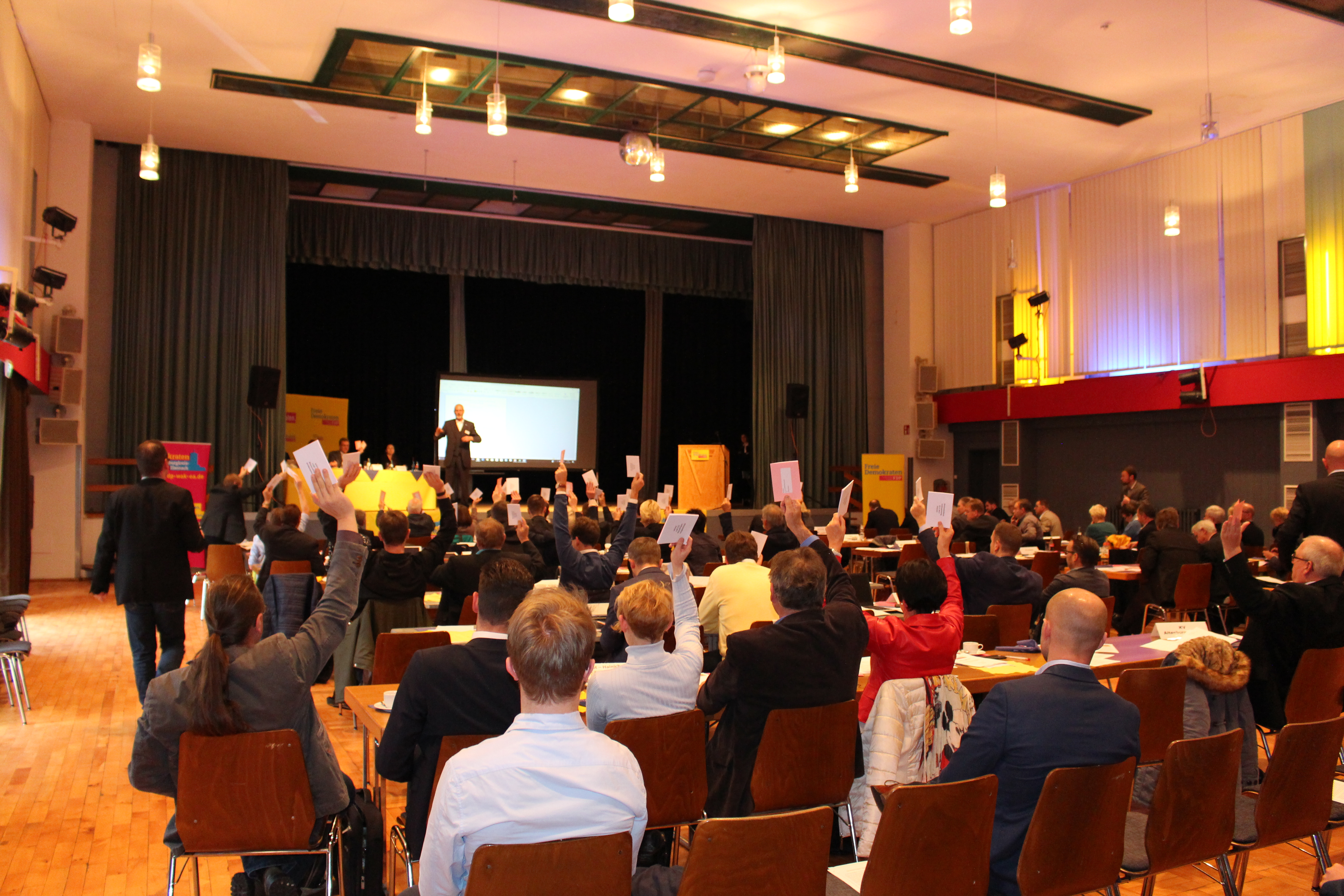 Das Plenum des Landesparteitages der FDP Thüringen bei einer Abstimmung, Bürgerhaus Eisenach